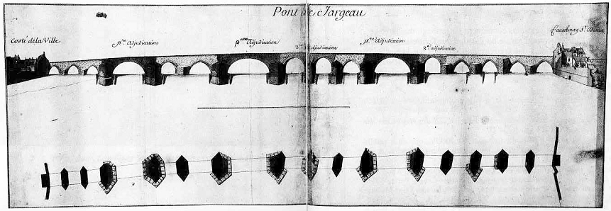 Plan et élévation de l'ancien pont de pierre de Jargeau, par l'ingénieur Mathieu après 1703